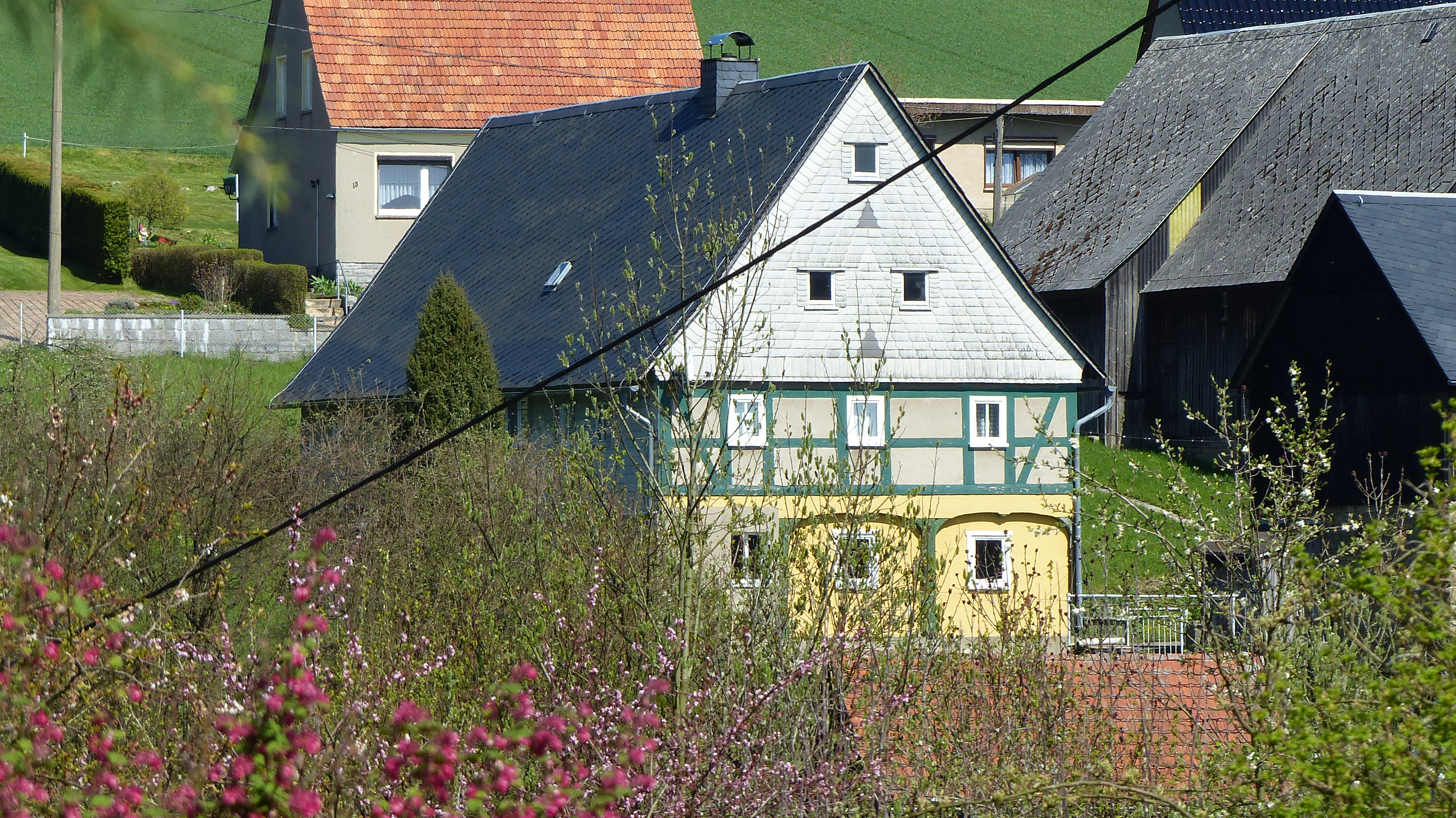 Denkmalgeschütztes Umgebindehaus, Obere Straße 16, Mittelndorf (Sebnitz)